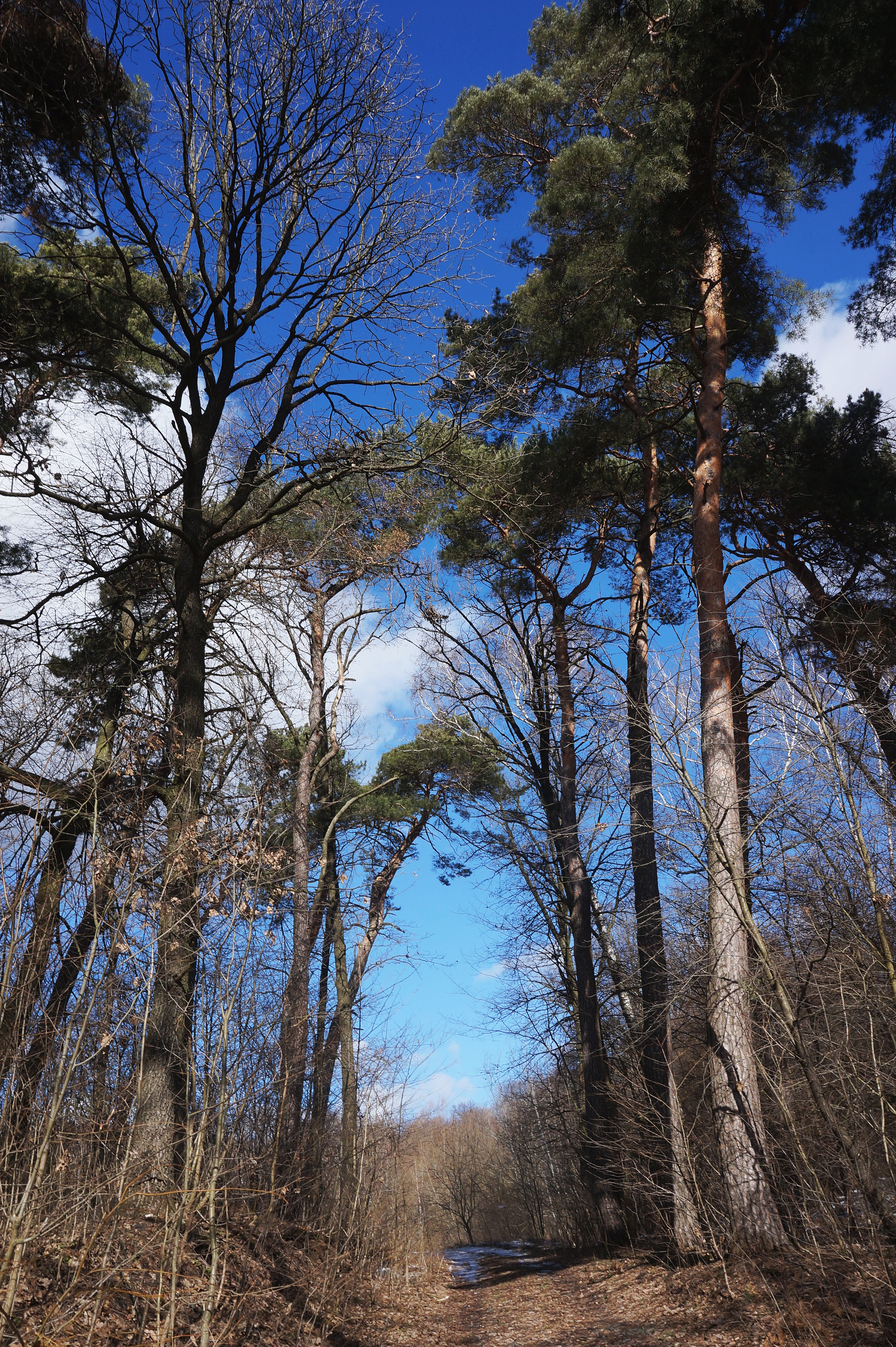 Осташки, Хмельницький район, Хмельницьке л-во кв. 12-15